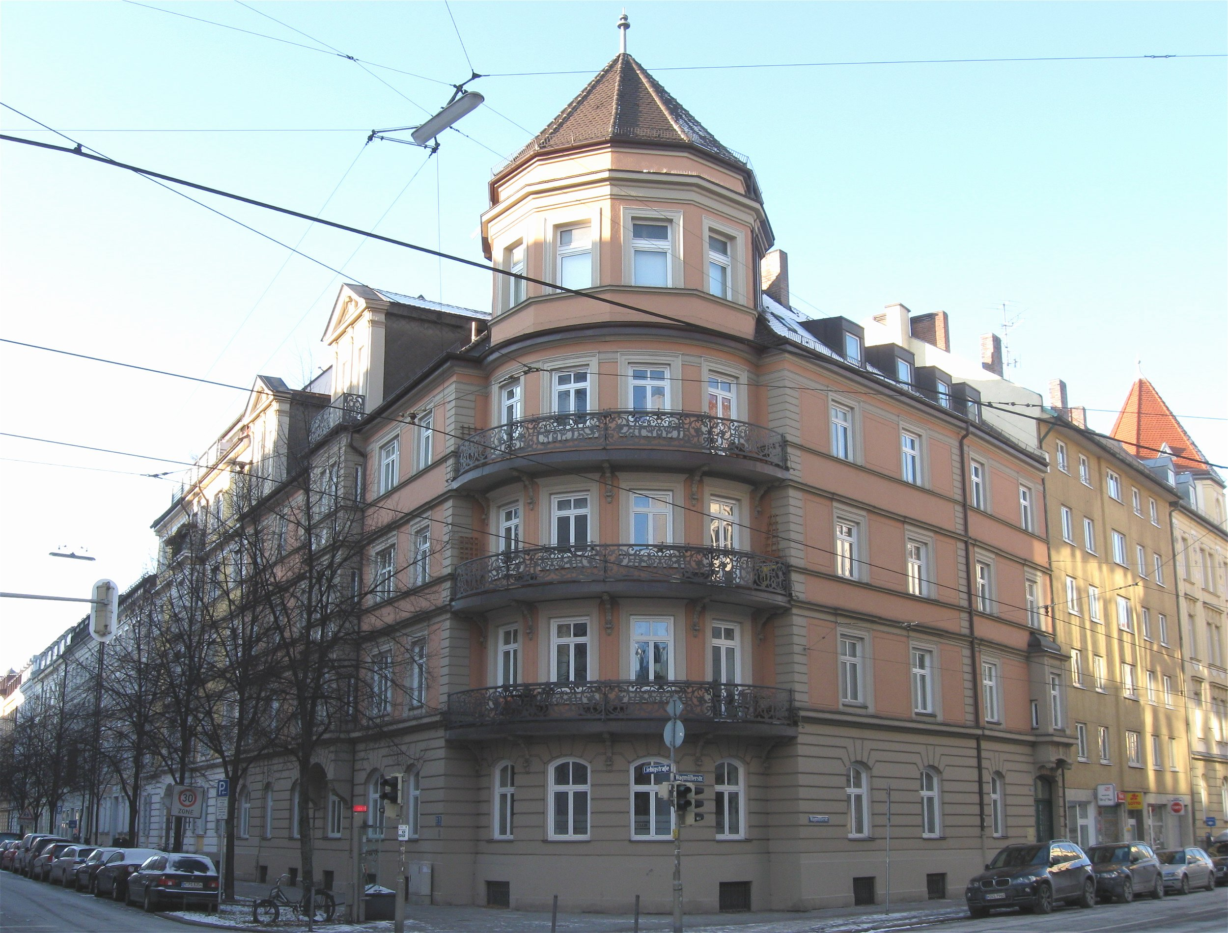 Liebigstraße 21; Mietshaus, Neurenaissance, Eckbau mit reich dekoriertem Erker und umlaufenden Balkonen am runden Eckturm, bez. 1882, von Gabriel von Seidl